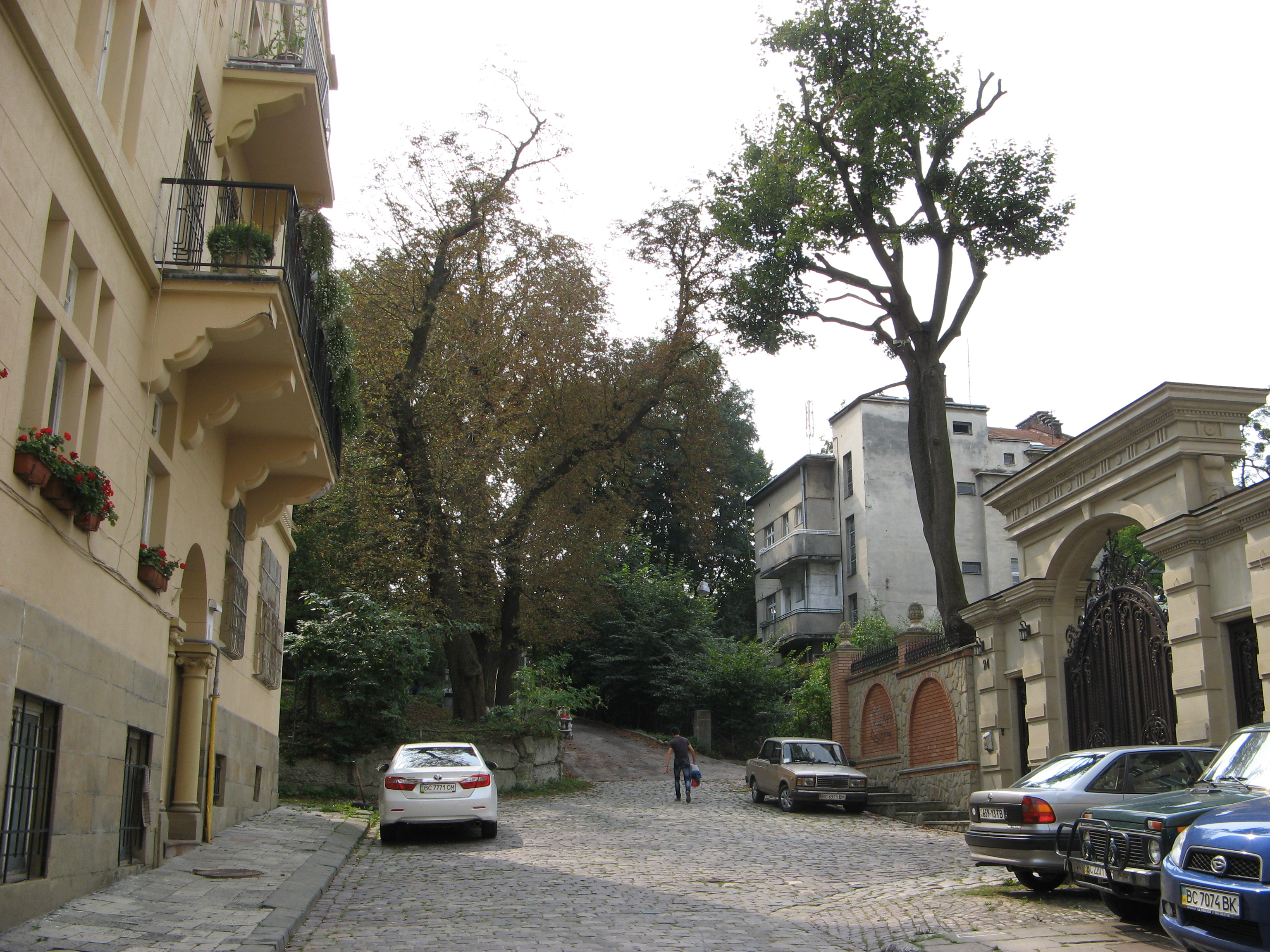 Львів, вул. Каліча Гора (місцевість Цитадель).